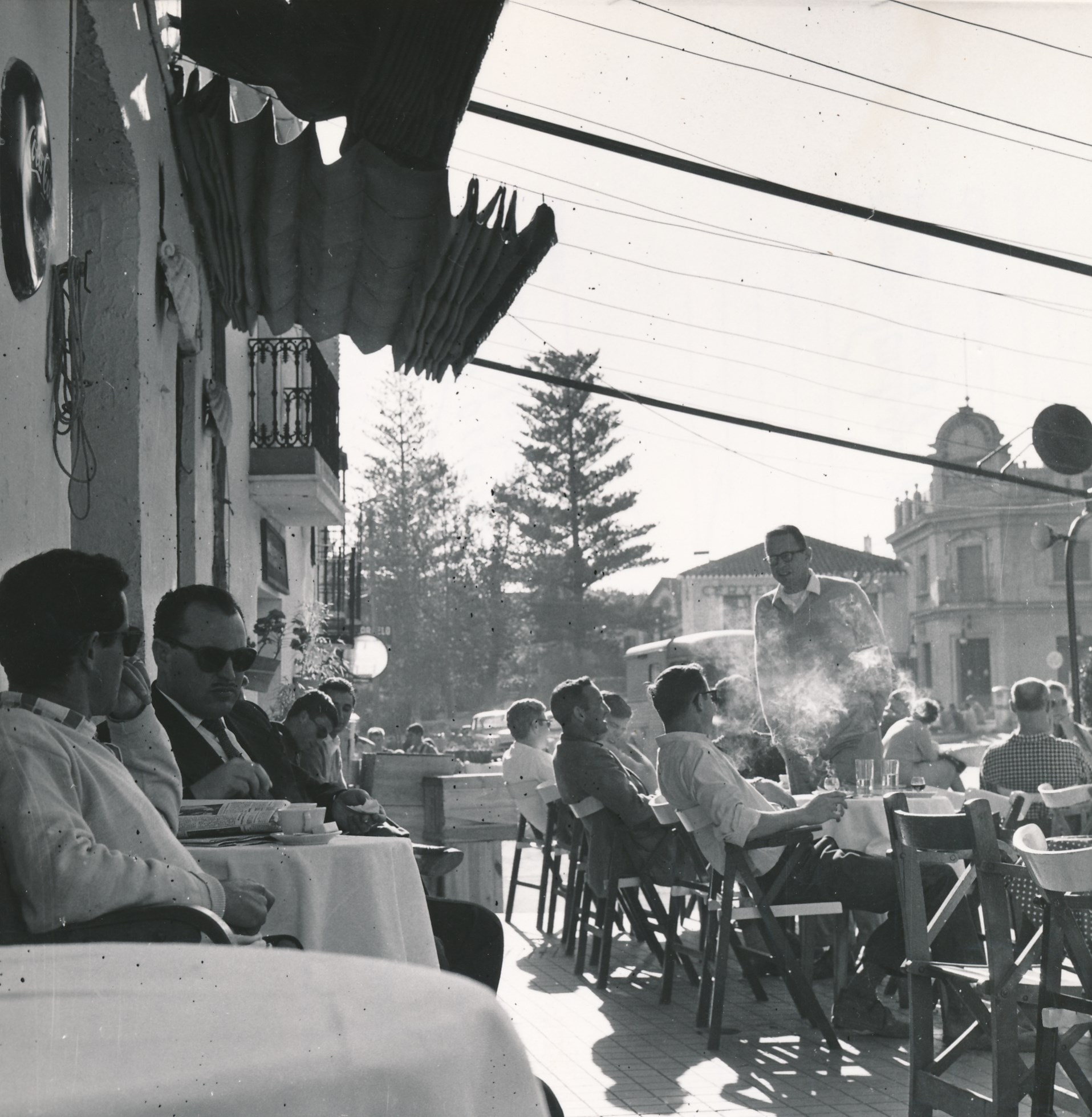 Torremolinos (Málaga), 1959 Procedencia: Desconocido Fotógrafo: Verdugo y Arranz Registro nº: 00752 Signatura: Caja 8 Fondos: Biblioteca de la Facultad de Empresa y Gestión Pública (Universidad de Zaragoza) Legado: Luis Fernández Fuster / E.S. Turismo Huesca